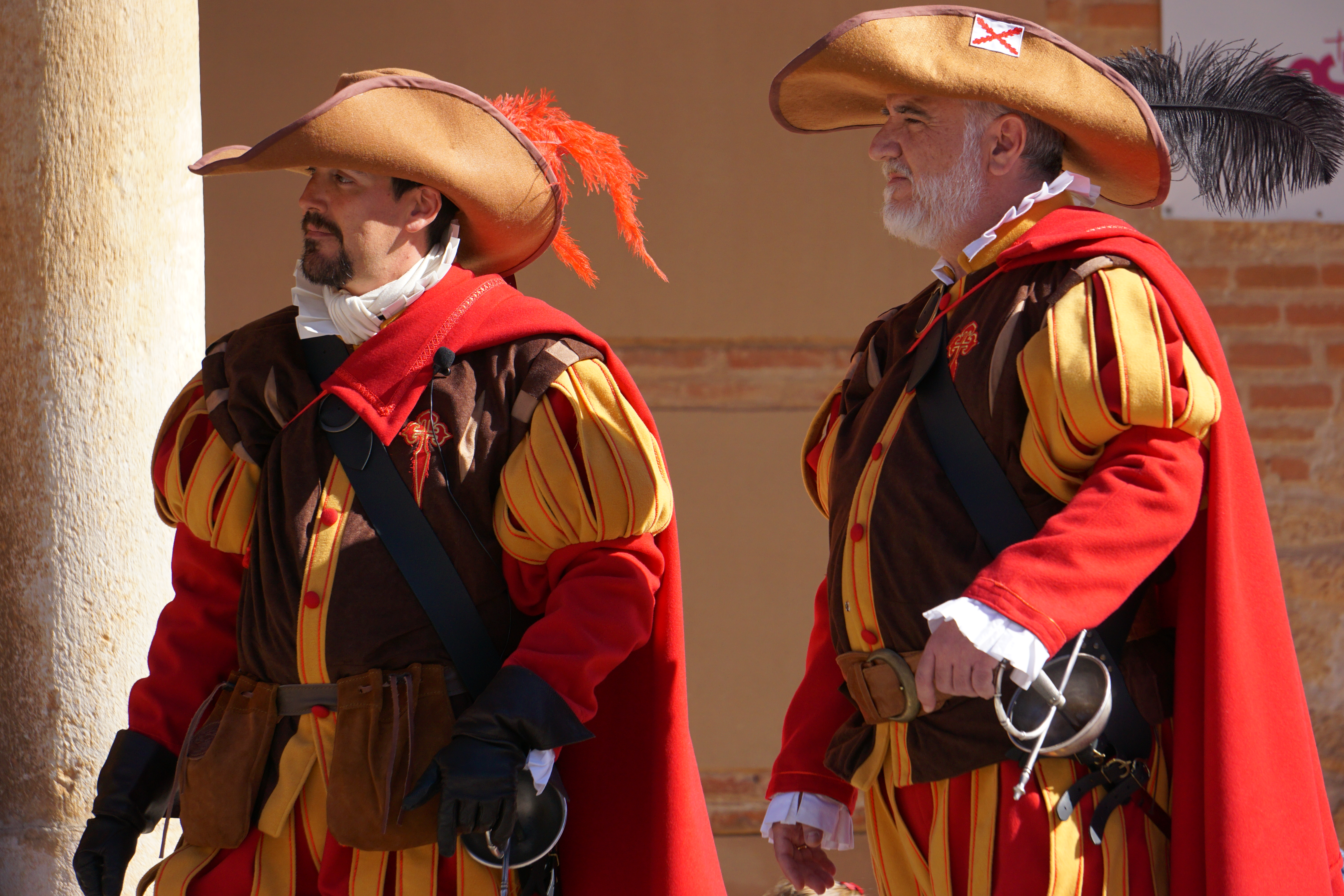 Dos capitanes de los Tercios de castilla durante una representación teatral en Guadalajara